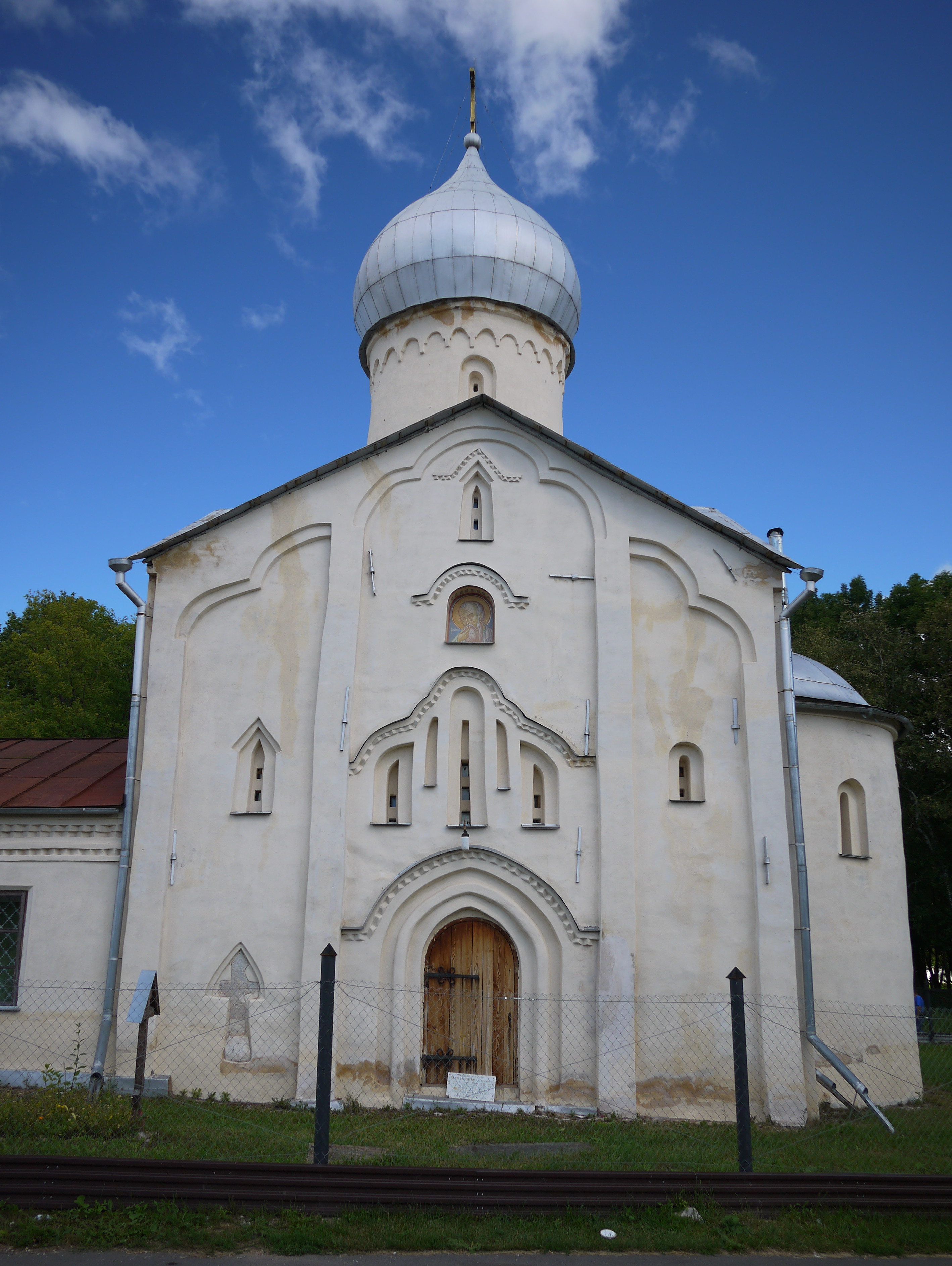 Церковь Иоанна Богослова на Витке (Новгородская область, Великий Новгород, Александра Невского наб.)